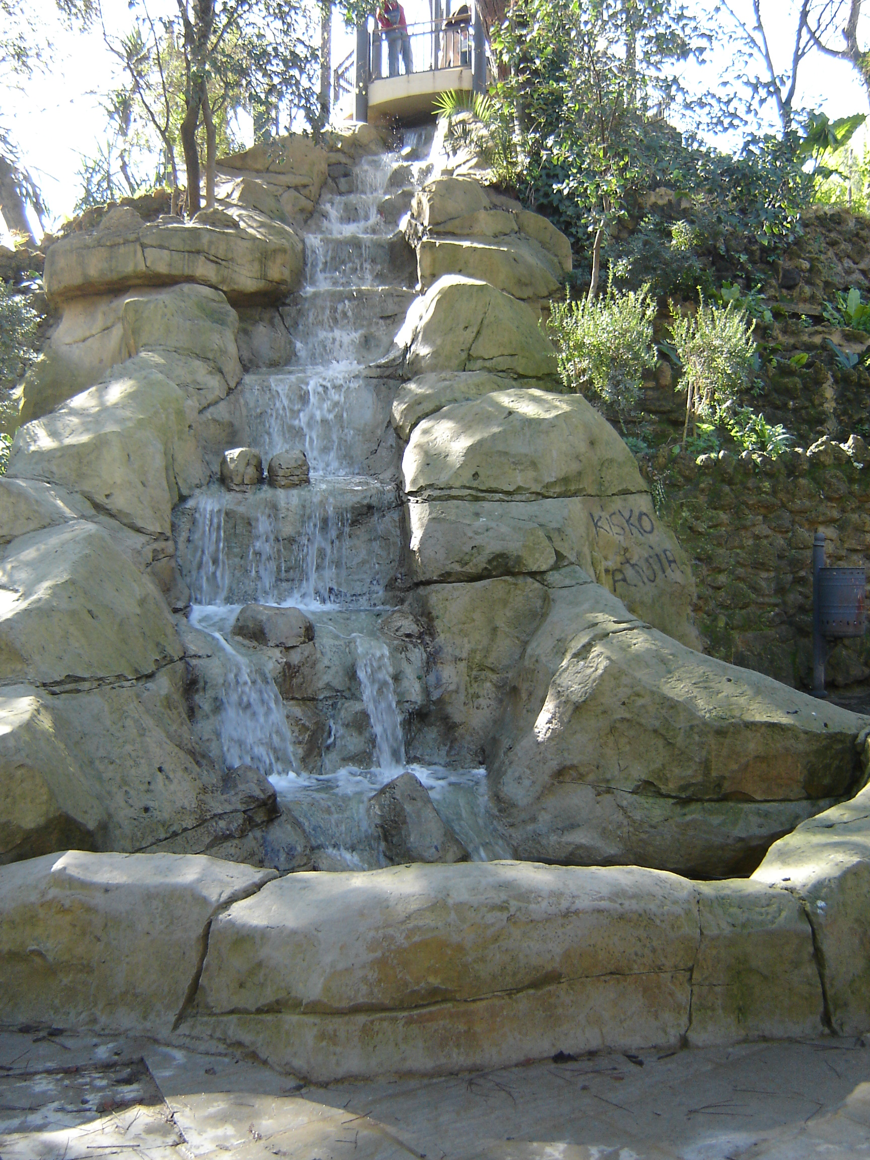 Monte Gurugú visto desde donde desemboca la cascada. Parque de María Luisa (Sevilla). Realización propia.